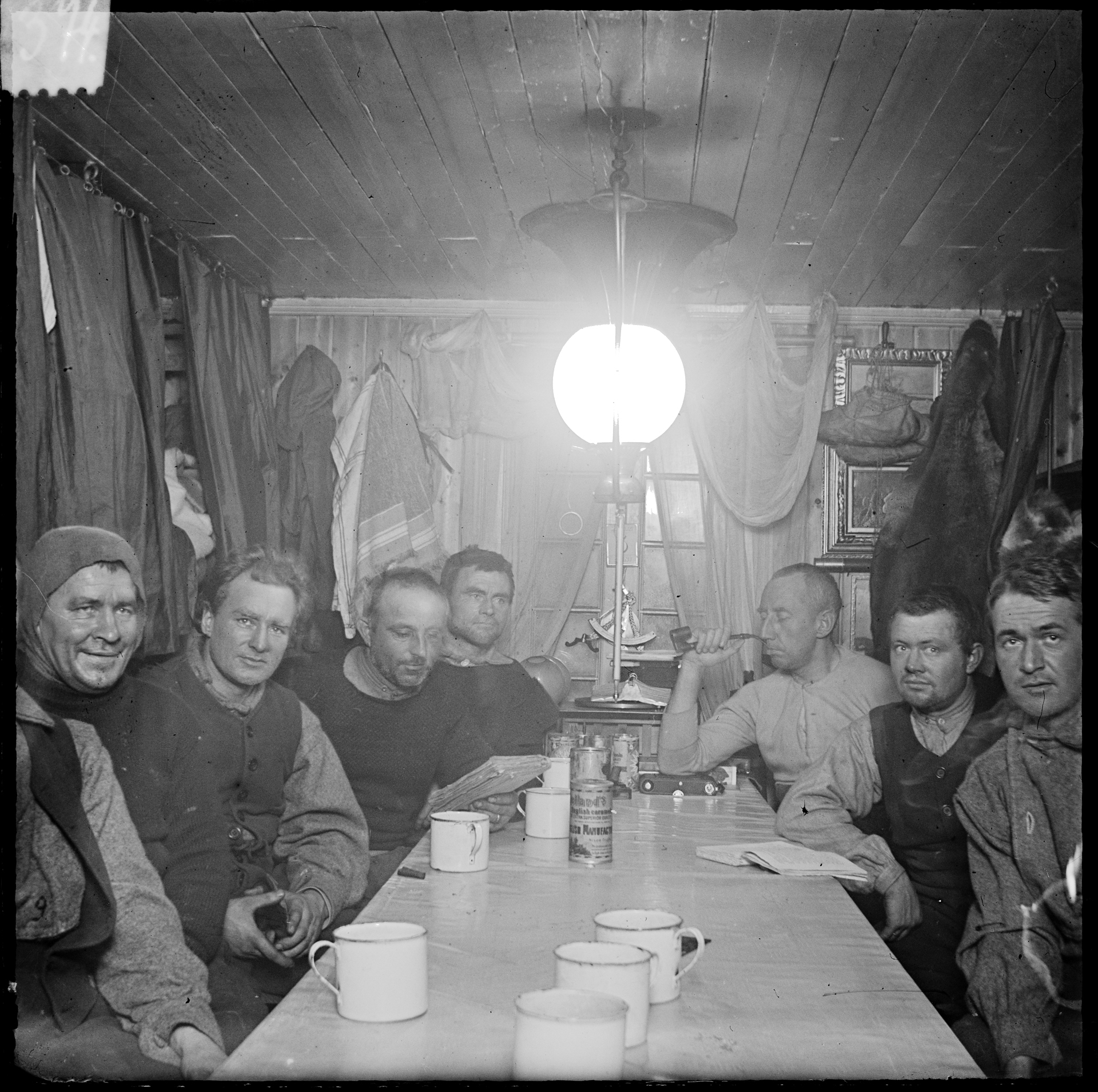 Tittel / Title: I Framheims stue Motiv / Motif: Negativ glassplate. Rundt bordet sitter Adolf Lindstrøm, Sverre Hassel, Oscar Wisting, Helmer Hanssen, Roald Amundsen, Jørgen Stubberud og Kristian Prestrud. Amundsen lener albuen på et fotoapparat. Dato / Date: 1911/1912 Fotograf / Photographer: ukjent / unknown Sted / Place: Antarktis, Hvalbukta, Framheim Eier / Owner Institution: Nasjonalbiblioteket / National Library of Norway Lenke / Link: Bildesignatur / Image Number: bldsa_NPRA1081